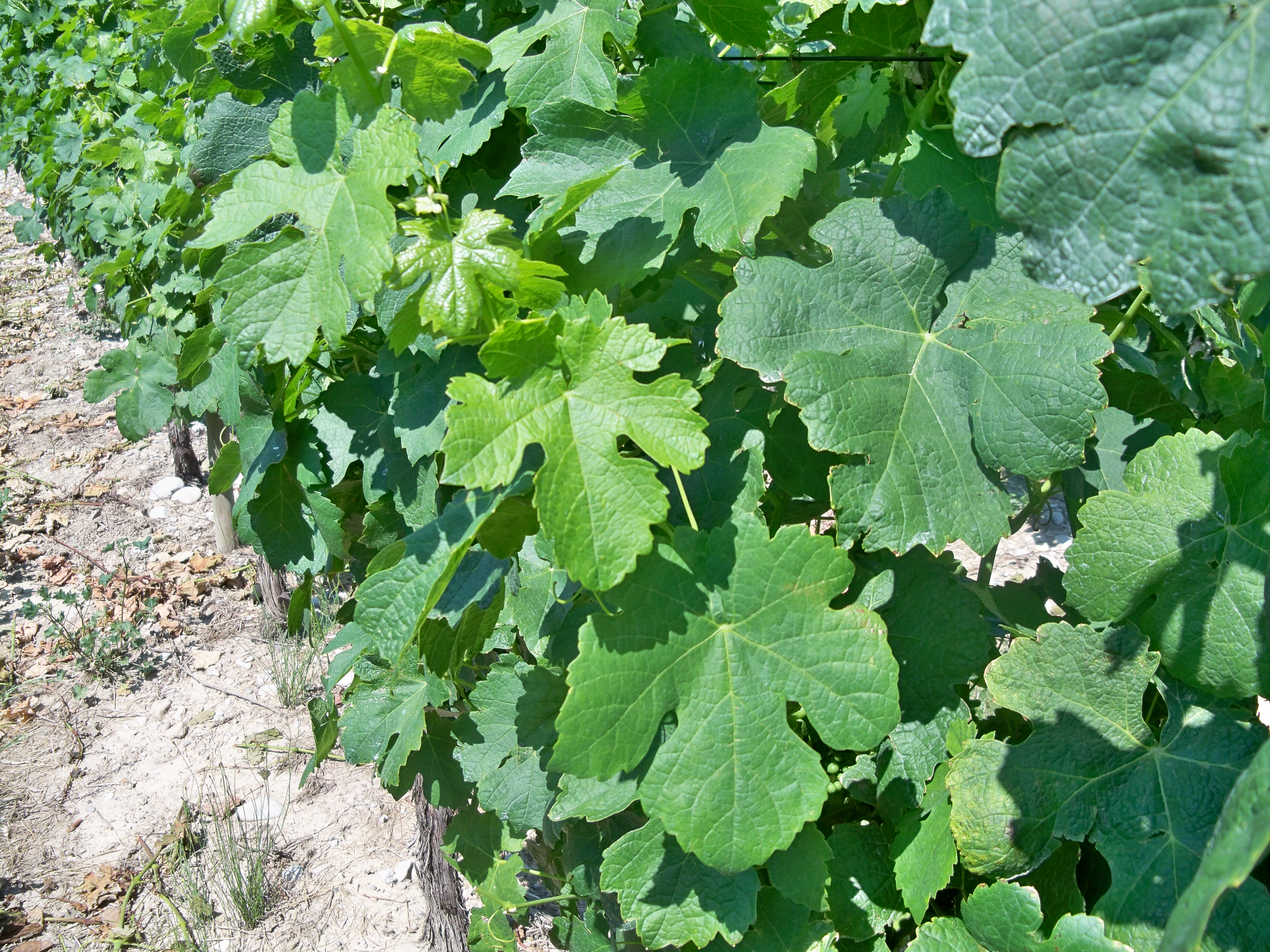 Feuilles de vignes - Roussane